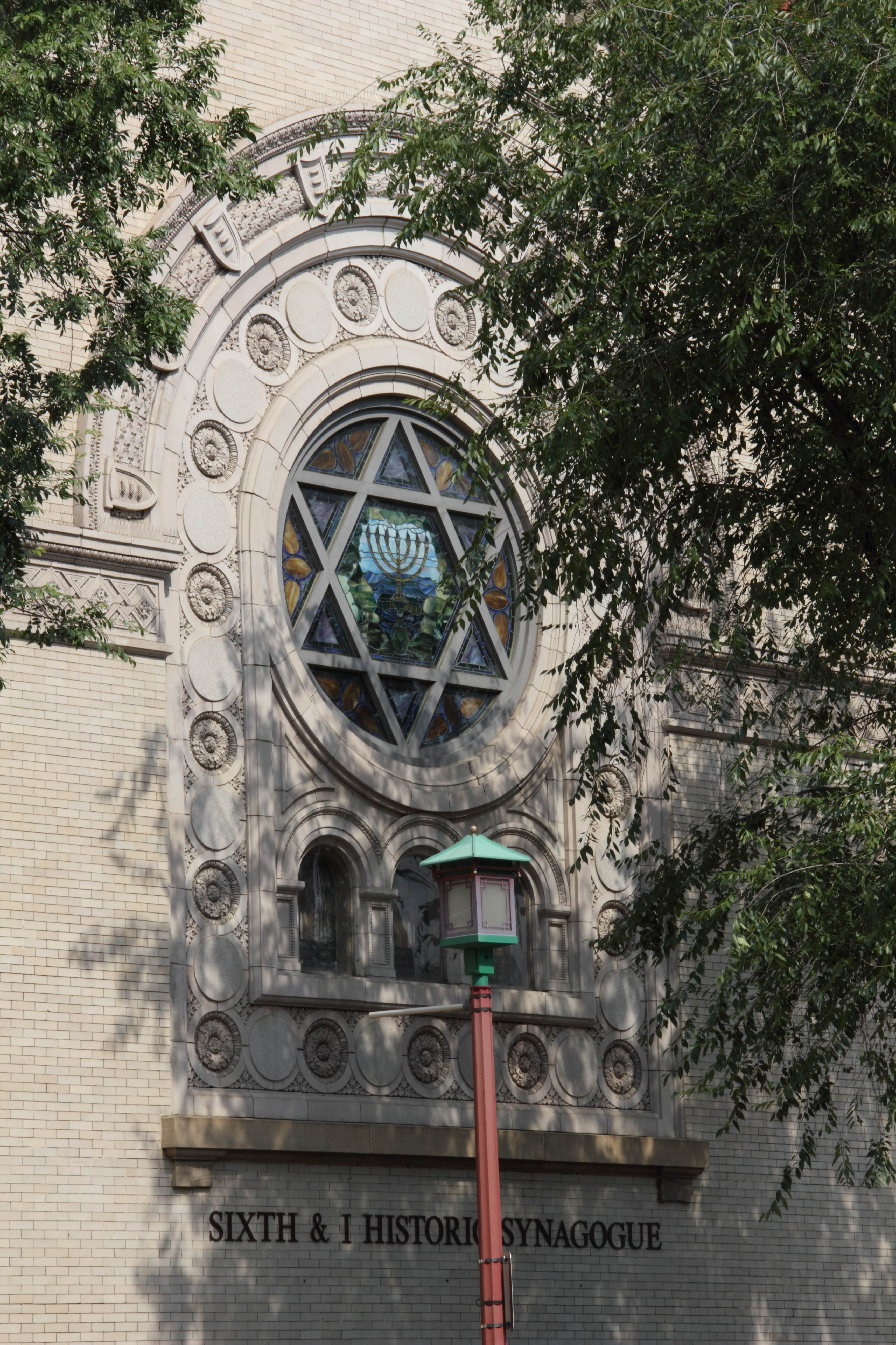 Chinatown, Washington DC